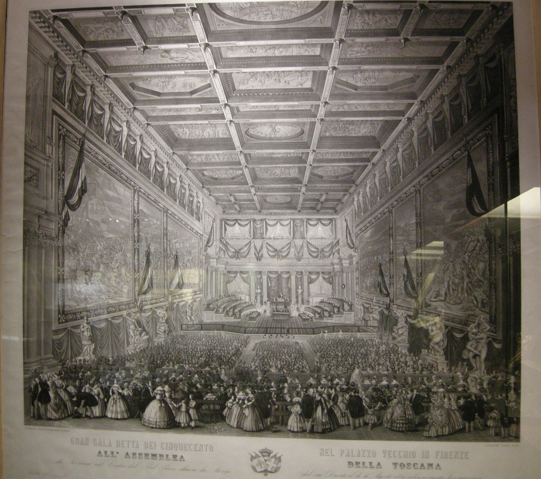 Firenze